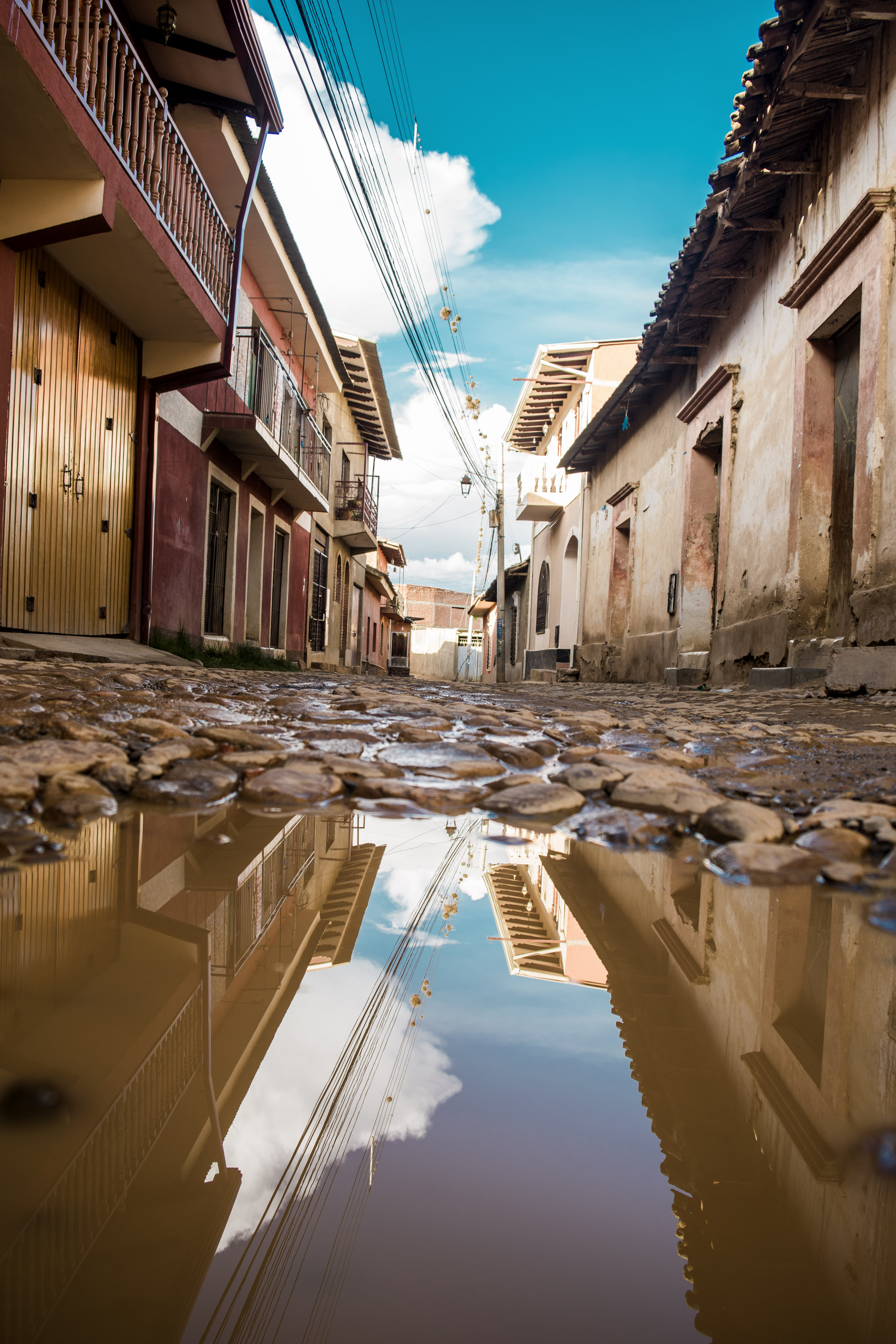 Tarata This medium shows the protected monument with the number C/00-407 in Bolivia.